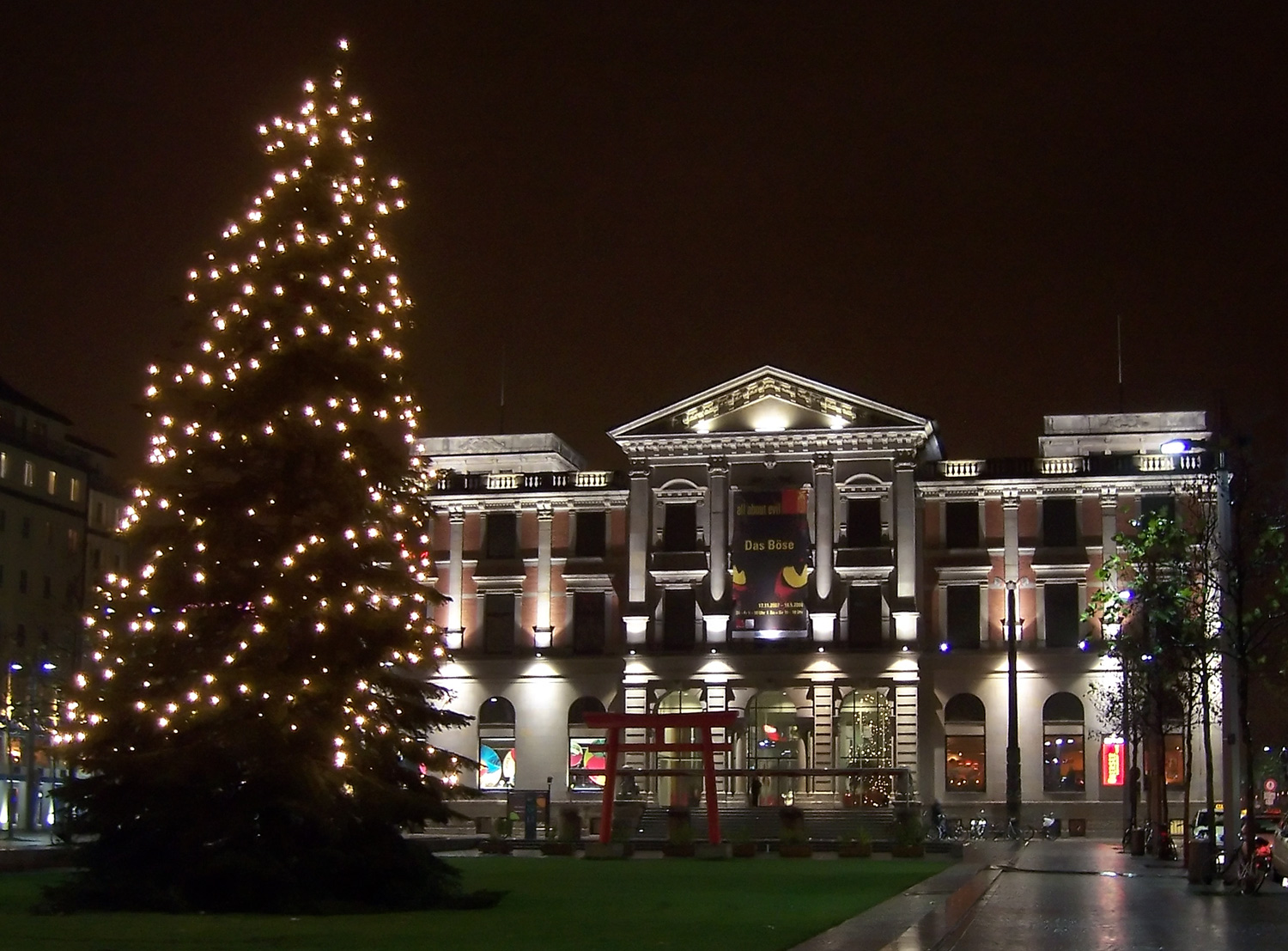 Überseemuseum Bremen)